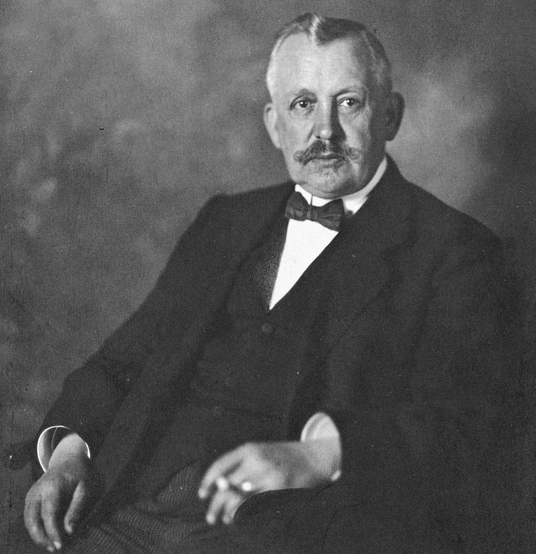 Le peintre luxembourgeois Auguste van Werveke (1866-1927)